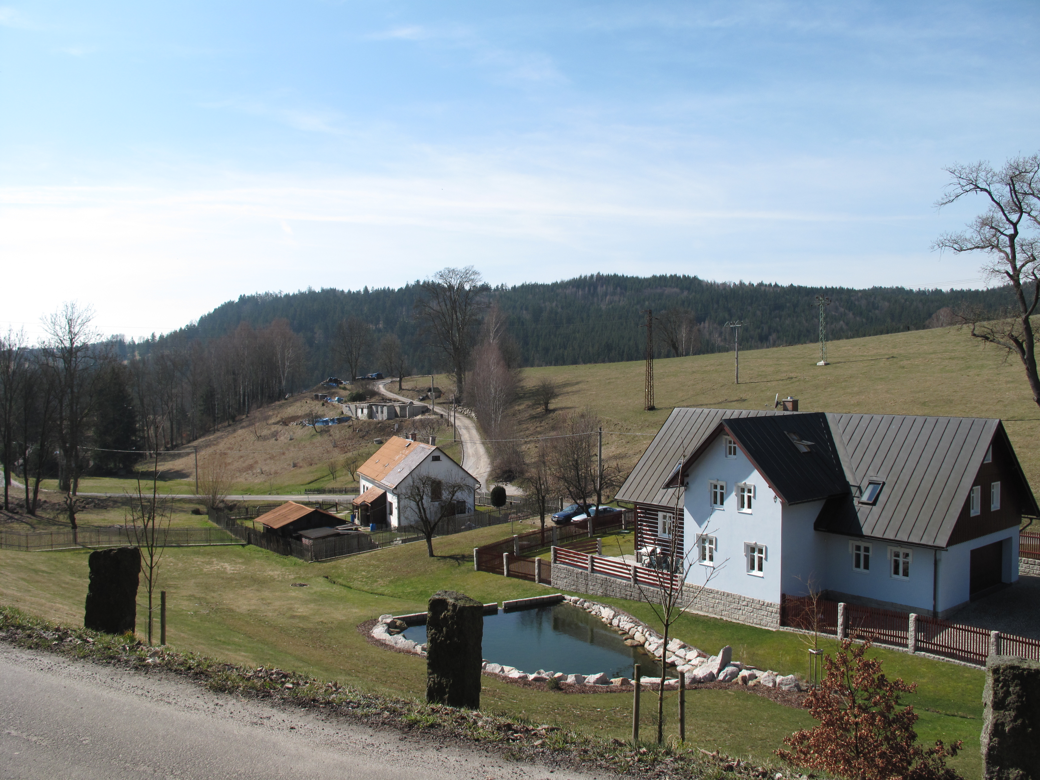 Domy v Hraničné. Okres Jablonec nad Nisou, Česká republika.